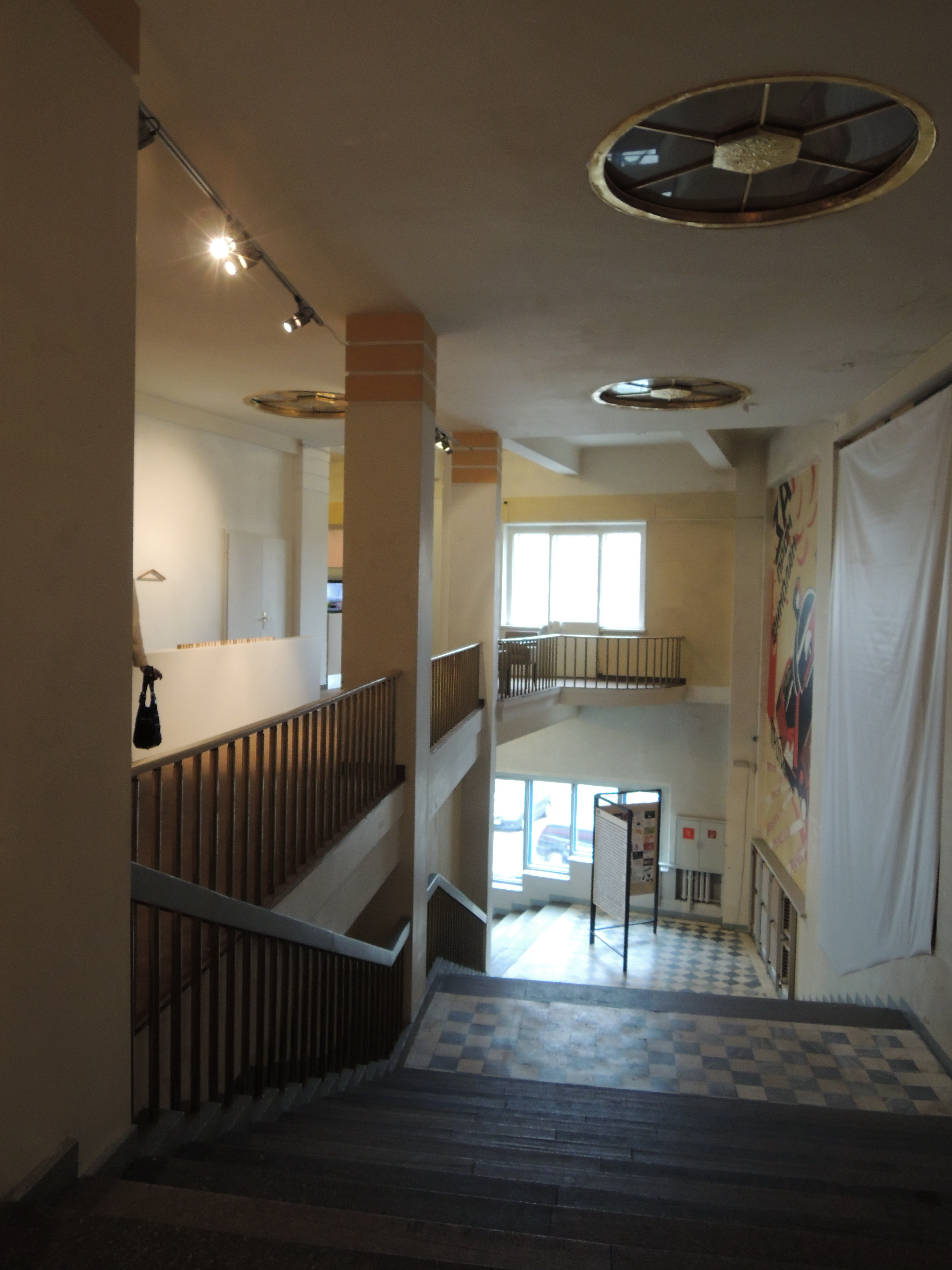 Кинотеатр "Ударник". 2012 год: сразу после того, как он стал собственностью фонда "Артхроника", которая начала производить реконструкцию интерьеров, в которых располагалось казино. Пресс-показ Премии Кандинского.